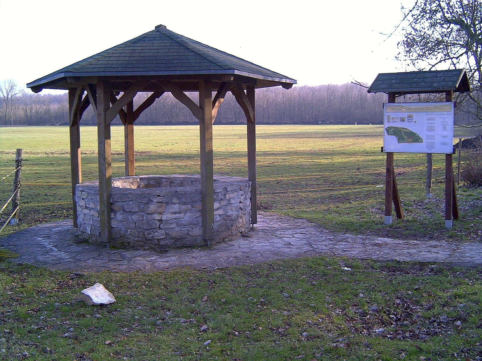 Possen: Schaubrunnen